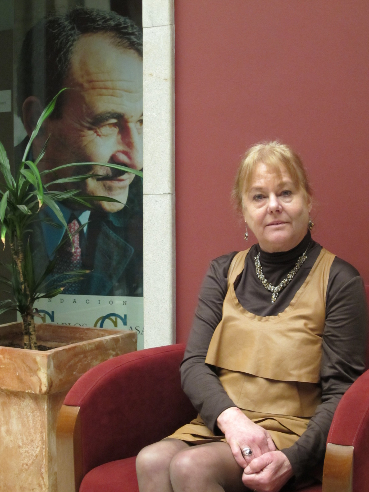 Kristina Berg, na Fundación Casares en marzo de 2012.